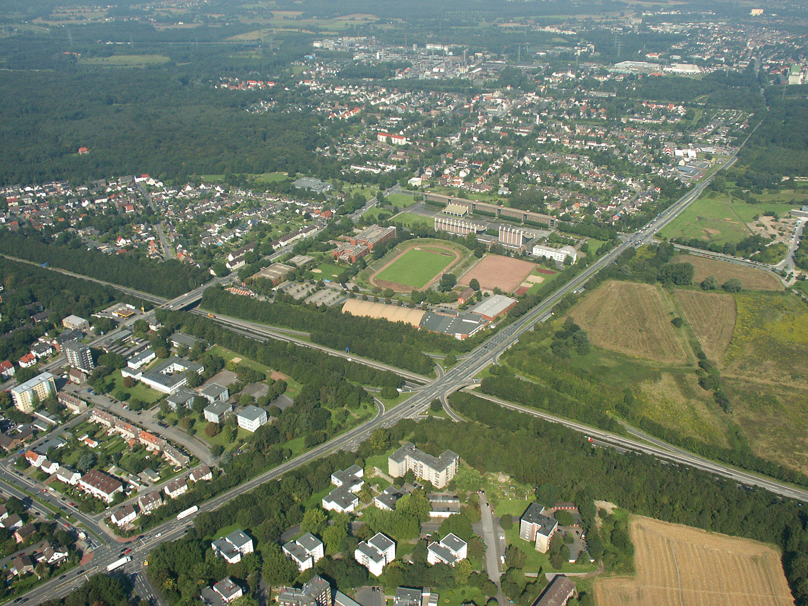 Castrop-Rauxel Stadtmittelpunkt, Luftaufnahme Richtung Nordwest, von rechts oben nach links unten führt die B235, von links nach rechts die BAB 42. Foto: N. Selisky